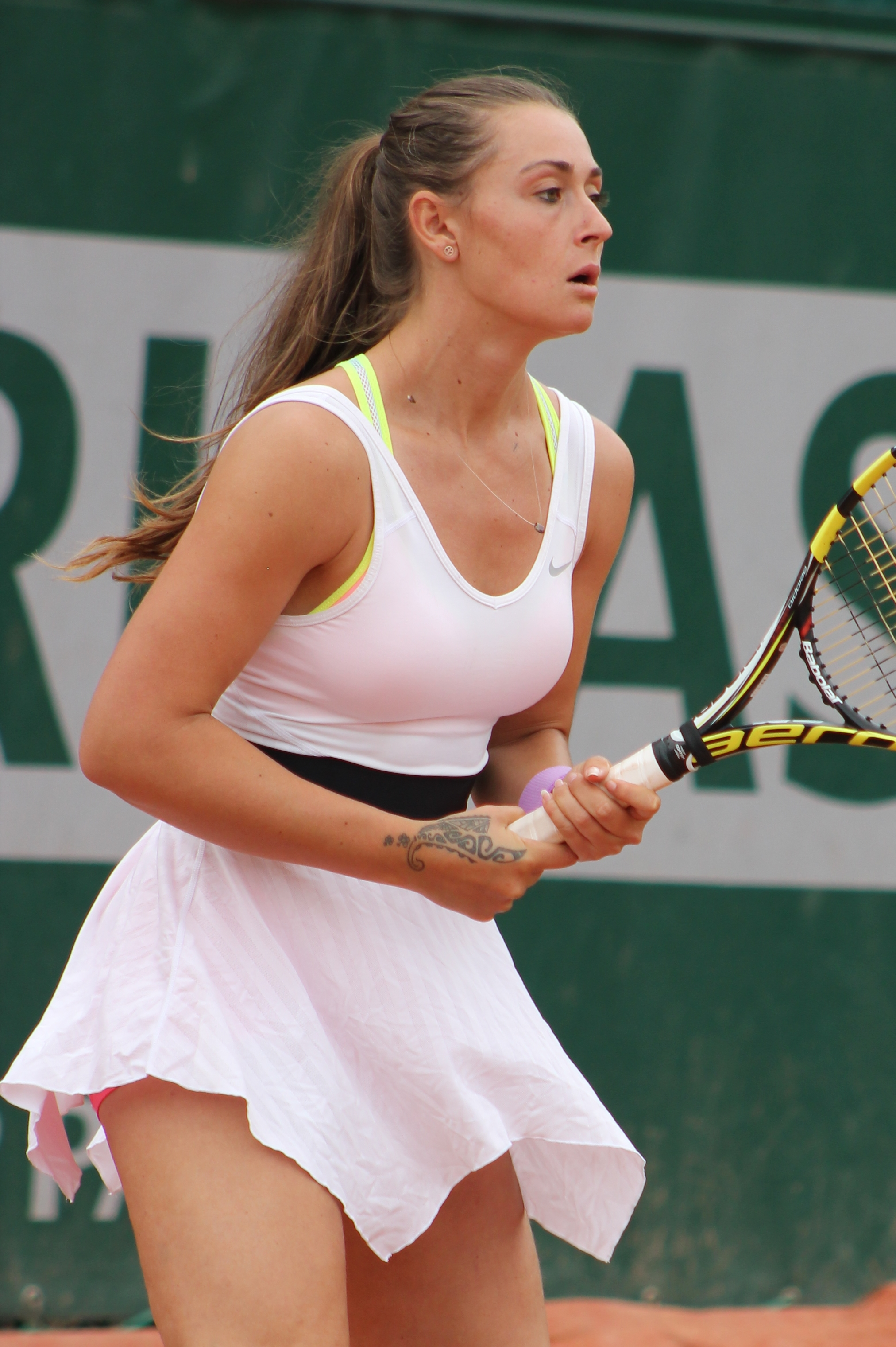 de Bernardi RG15 (14)